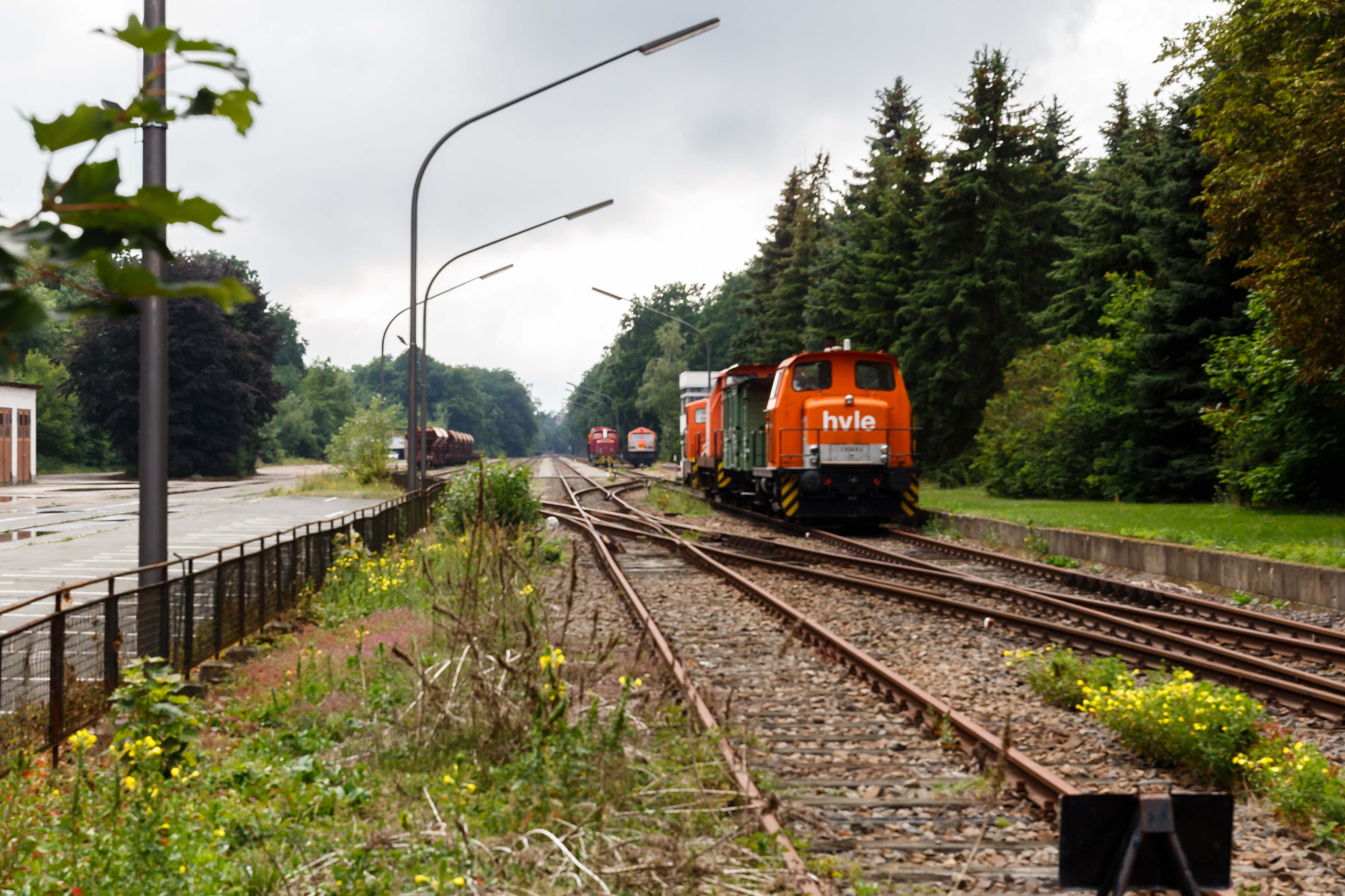 Bahnhof Johannesstift in Berlin-Hakenfelde